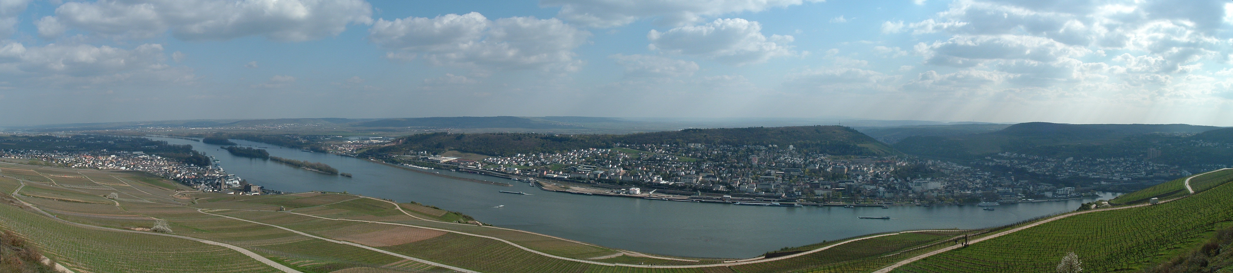 Panorama de la vallée du Rhin, du monument de Niederwald